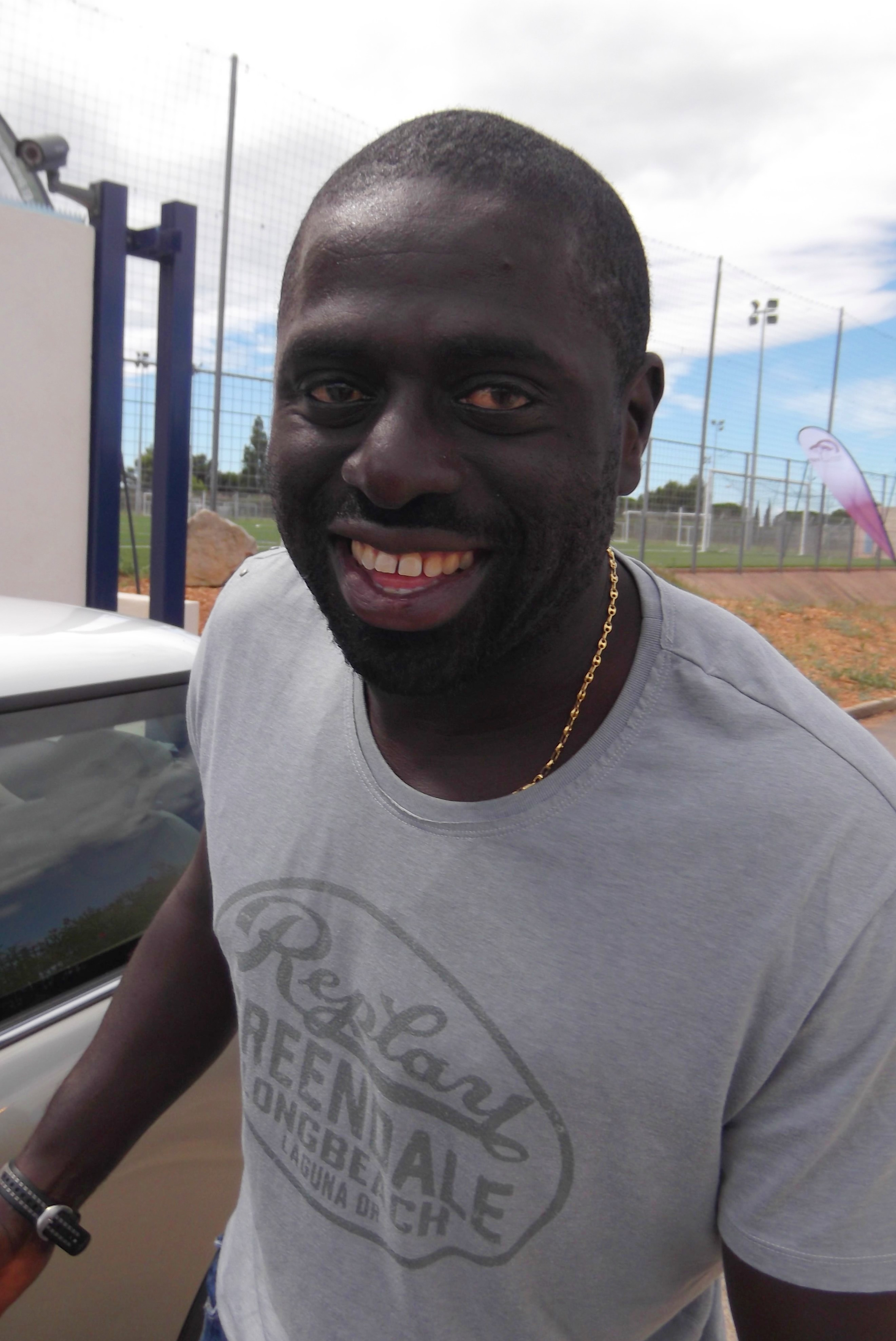 Frédéric Mendy en 2013.